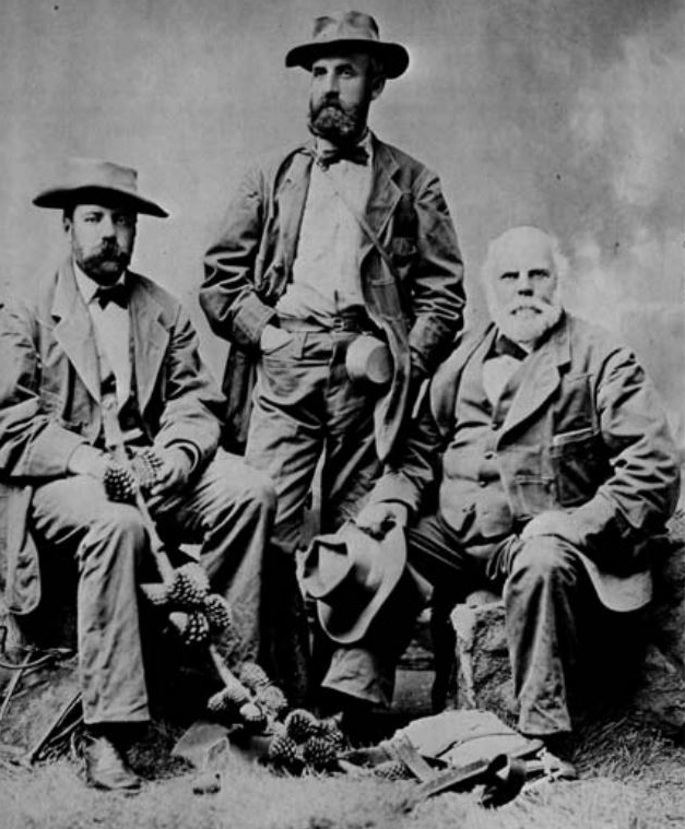 Charles Sprague Sargent, Francis Skonner und George Engelman, Expedition 1880 für den 10. US Forestry Census